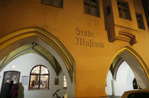 Ausstellungseröffnung der Sonderausstellung Der Wasserburger Taubenmarkt im Museum Wasserburg a. Inn. Die raumübergreifende Fotoinstallation des Fotokünstlers Andreas Bohnenstengel im Museum Wasserburg geht zurück auf eine Fotodokumentation der Märkte von 1996 und 1997. Sie zeichnet einen Markttag ausgehend von der Ankunft der Händler in der Nacht und dem anschließenden Markttreiben nach. Dabei gelingt es durch die individuelle künstlerische Perspektive Geschichte und Seele des Wasserburger Taubenmarktes erlebbar zu machen.